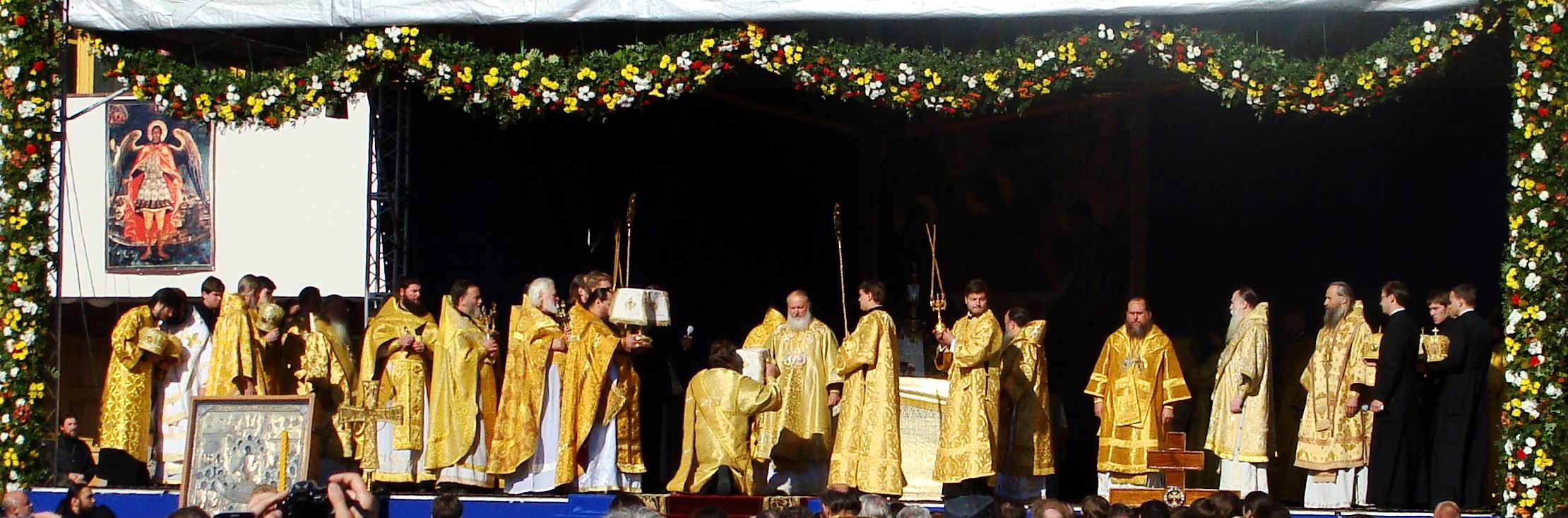 Патриарх Кирилл